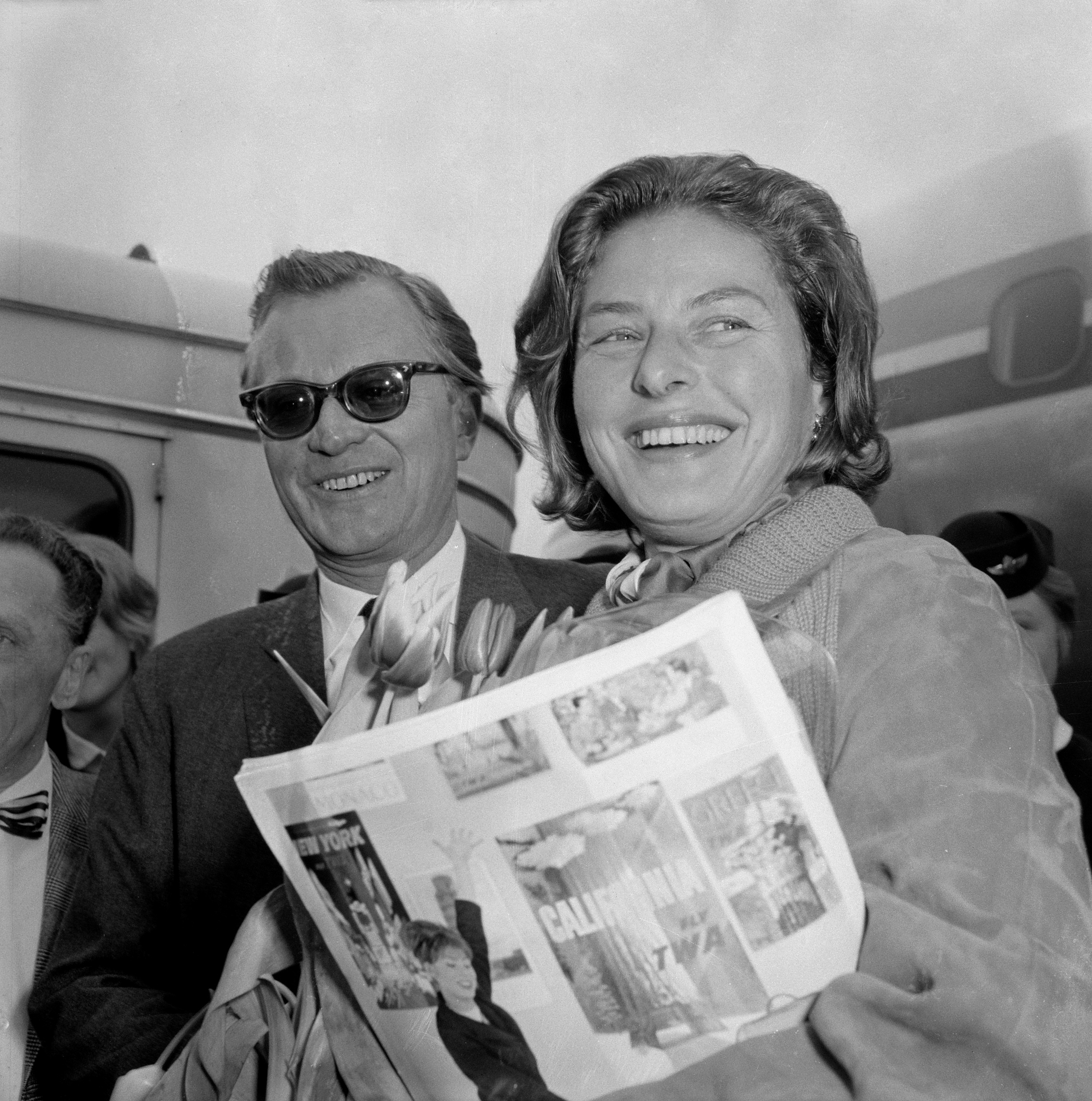 Collectie / Archief : Fotocollectie Anefo Reportage / Serie : [ onbekend ] Beschrijving : Aankomst Ingrid Bergmann op Schiphol Lars Schmidt en Ingrid Bergmann Datum : 15 maart 1961 Locatie : Noord-Holland, Schiphol Trefwoorden : aankomsten Persoonsnaam : Ingrid Bergmann, Schmidt, Lars Fotograaf : Lindeboom, Henk / Anefo Auteursrechthebbende : Nationaal Archief Materiaalsoort : Negatief (zwart/wit) Nummer archiefinventaris : bekijk toegang 2.24.01.03 Bestanddeelnummer : 912-2299